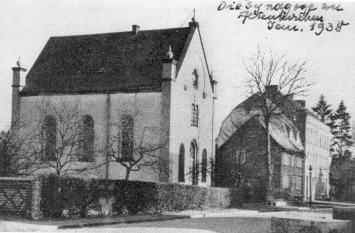 Ansichtskarte mit der Synagoge in Altenkirchen (Westerwald)